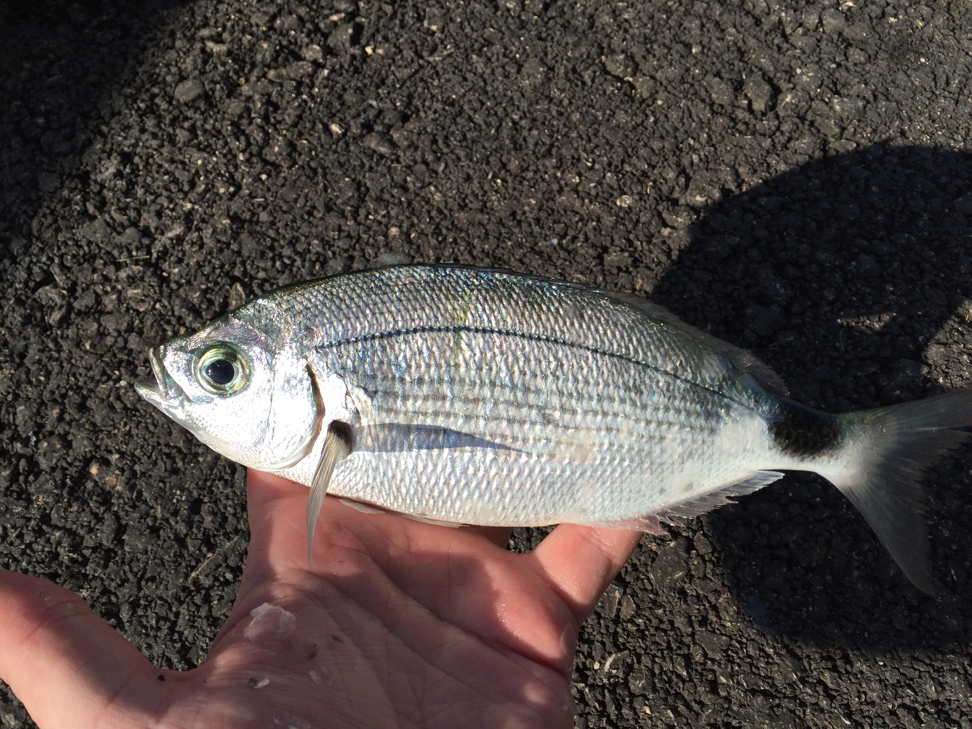 nahe Rovinj